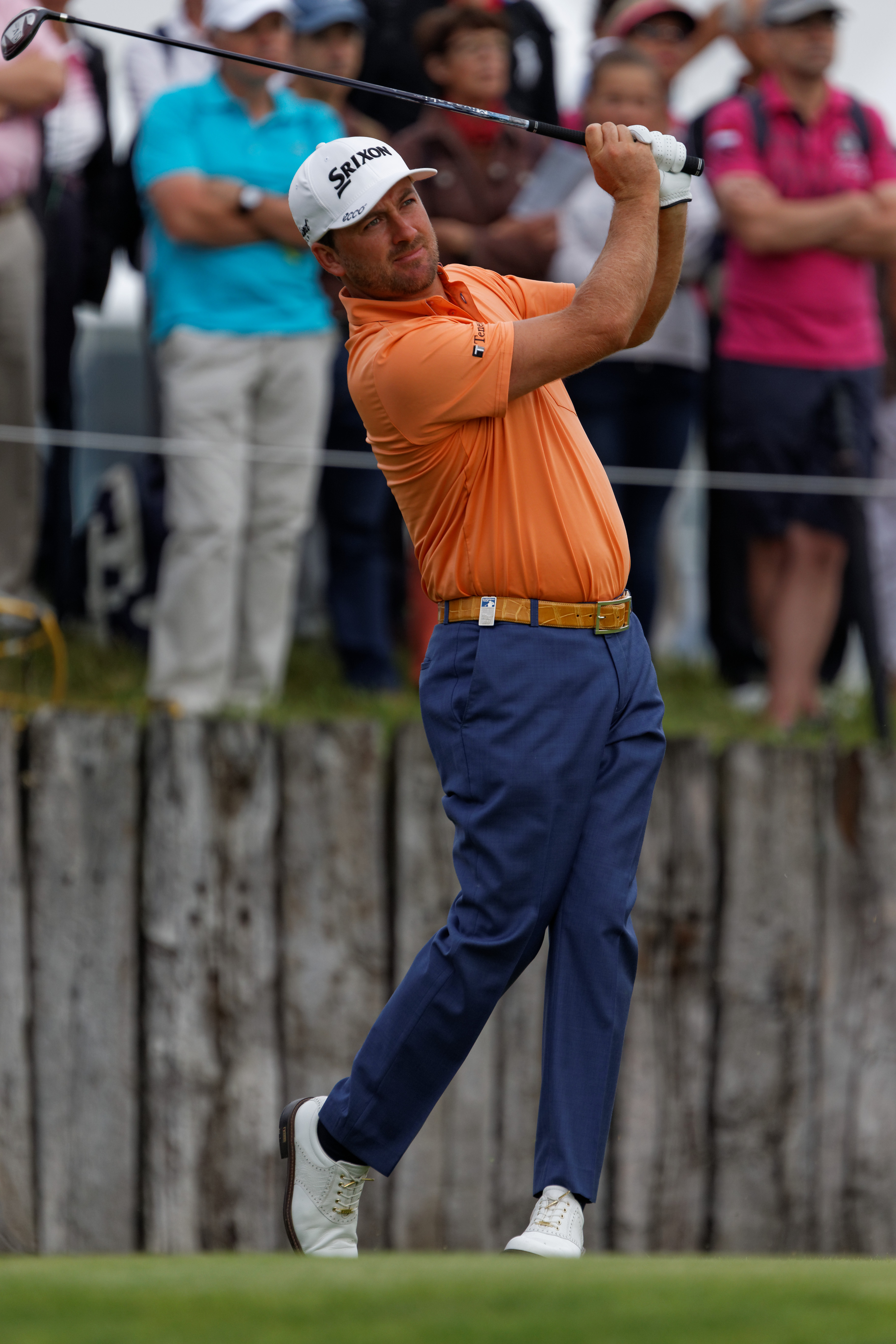 Graeme Mc Dowell lors du second tour de l'Open de France 2014